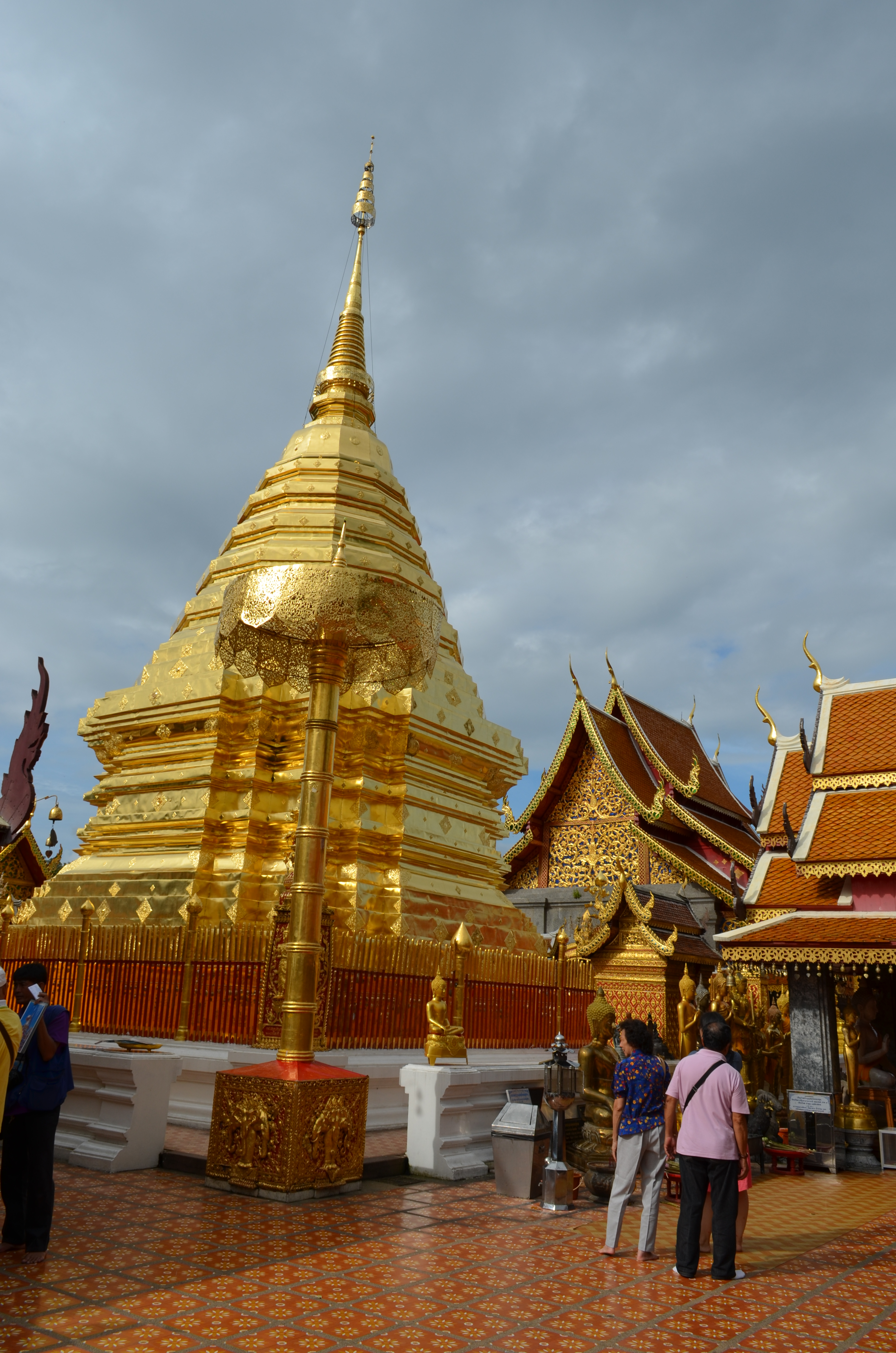 Wat Phrathat Doi Suthep, il più famoso,costruito nel 1383, situato su una collina a 15 km a nord-ovest, è particolarmente sacro per i thailandesi che ne fanno una meta di pellegrinaggio. Dal tempio, a cui si accede salendo 309 gradini o con un tram, si gode di uno stupendo panorama sulla città.